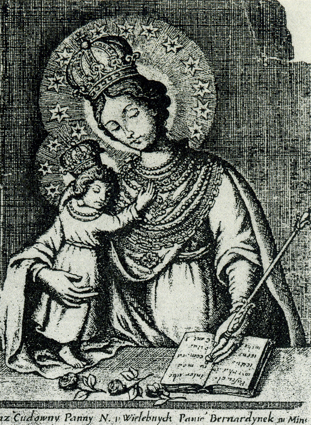 Беларуская (тарашкевіца): Гравюра, зробленная Лявонціем Тарасевічам з абраза Маці Божай з Дзіцяткам, які захоўвался ў галоўным алтары менскага касьцёла бэрнардынак